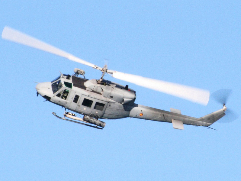 Un helicóptero Agusta Bell AB 212 de la Armada Española en una exhibición aeronaval celebrada en Santander el 29 de mayo de 2009. (Imagen recortada y reparada)